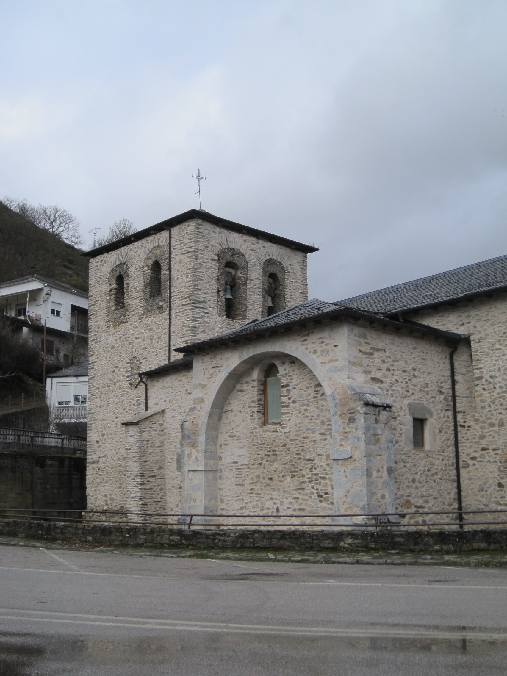 Iglesia de Santa Marina, en Balboa (León, España).